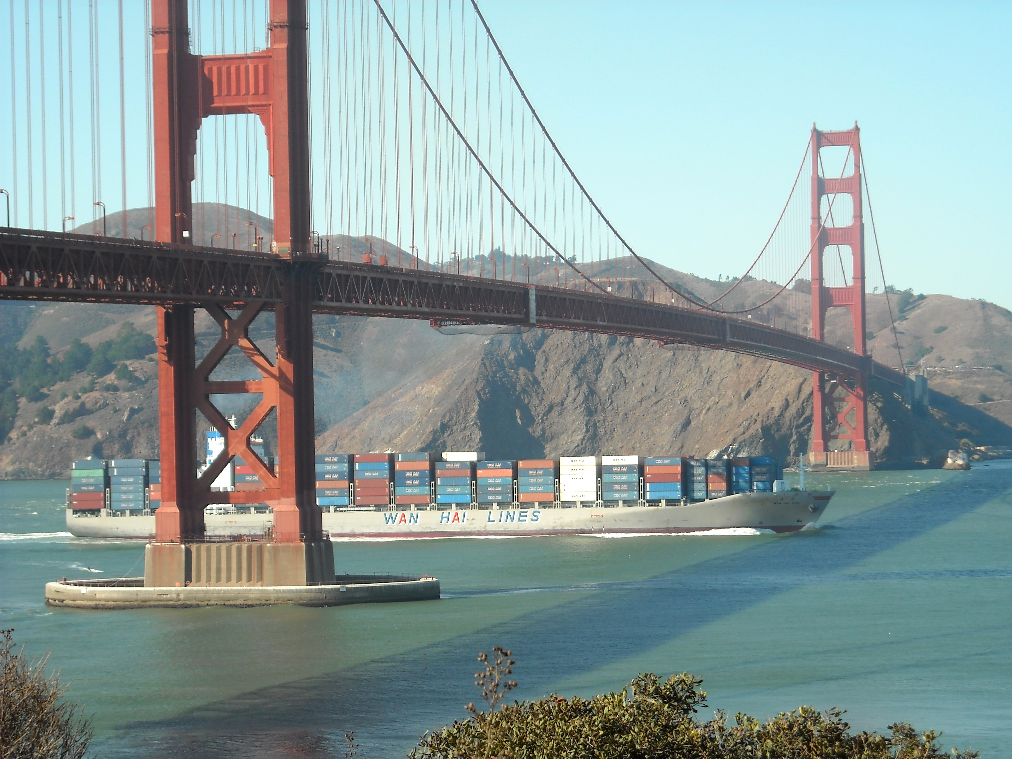 Container Ship under Golden Gate Bridge